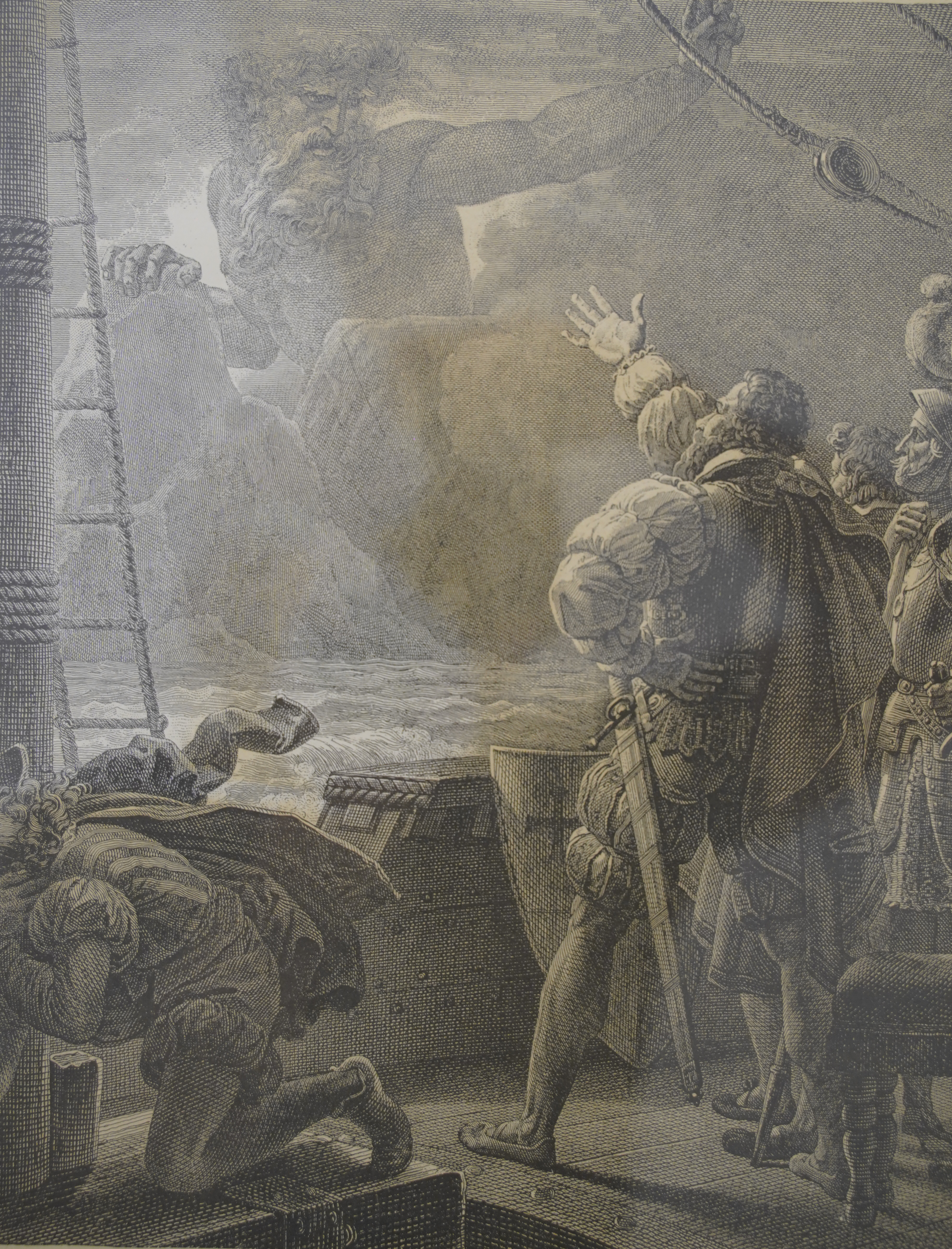 Cruzador português Adamastor